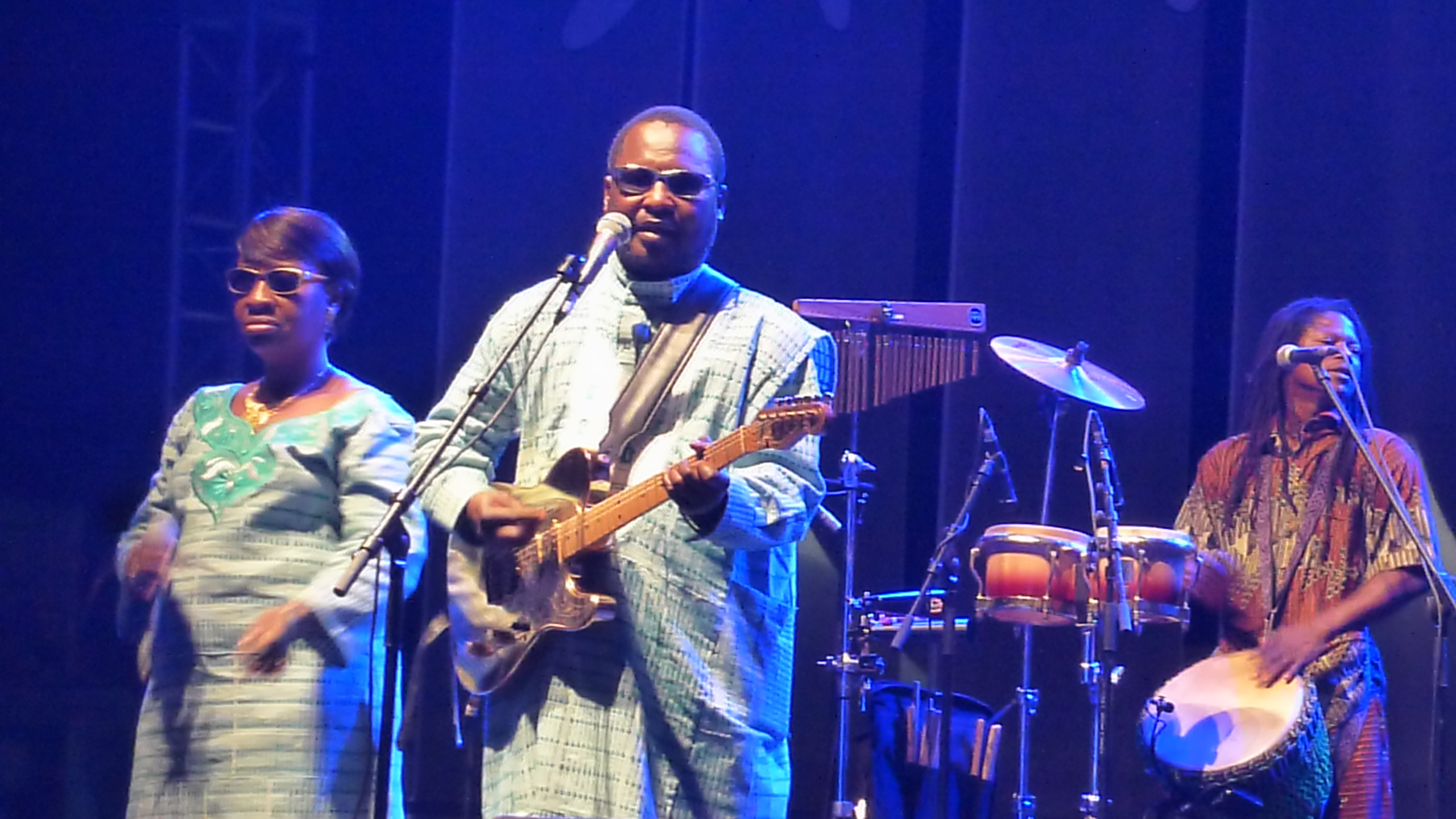 Amadou and Mariam at Festival das Musicas do Mundo FMM 2013 in Sines/Portugal